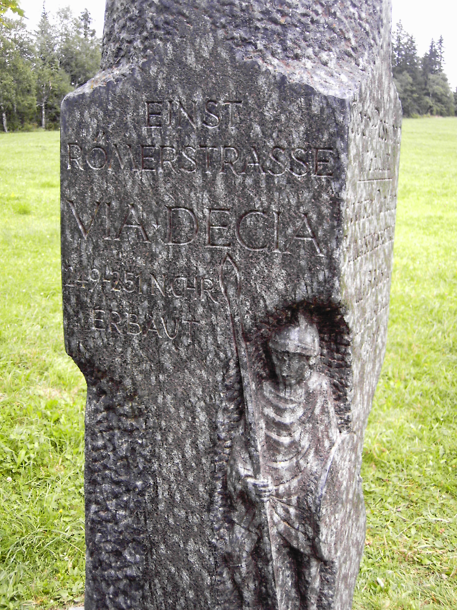 Passhöhe Jochpass, höchster Punkt im Bundesstraßennetz